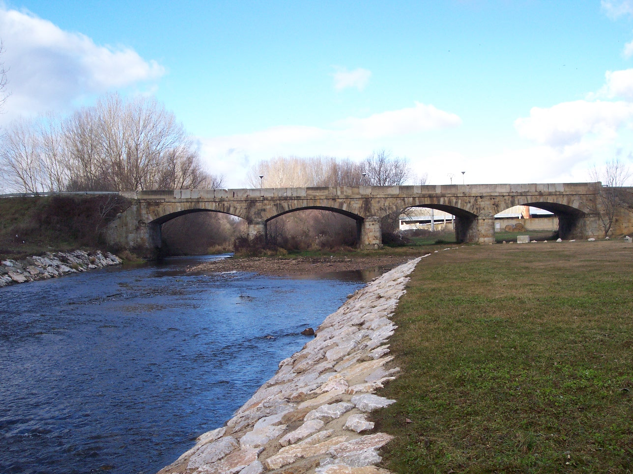 Puente de la N-120 sobre el río Tuerto en San Justo.